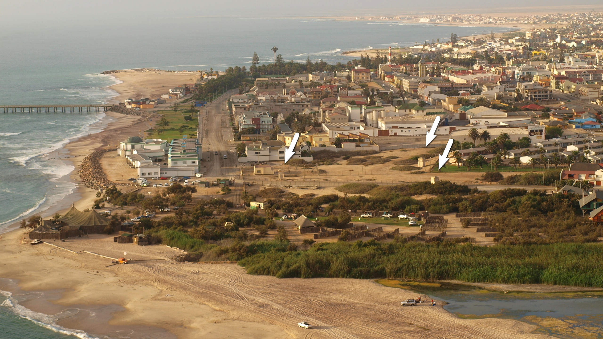 Swakopmund aus südlicher Richtung. Die Pfeile markieren die Verankerungstürme der Antenne der ehemaligen Funkstation.